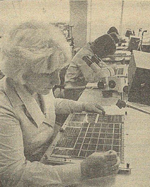 Elwro, R-32, szycie pamięci ferrytowych